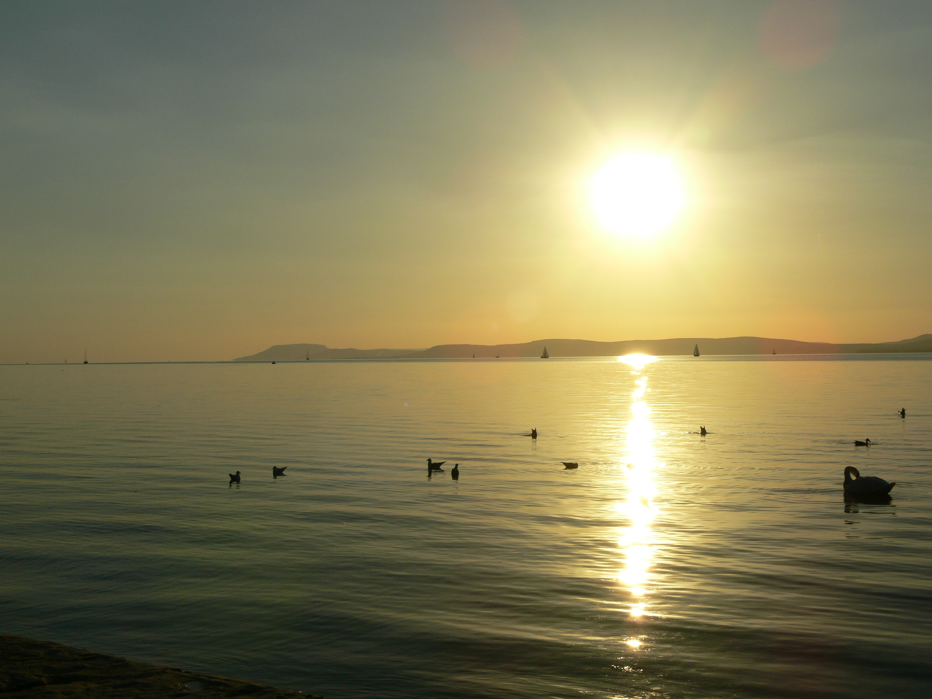 Balatonföldvár, naplemente